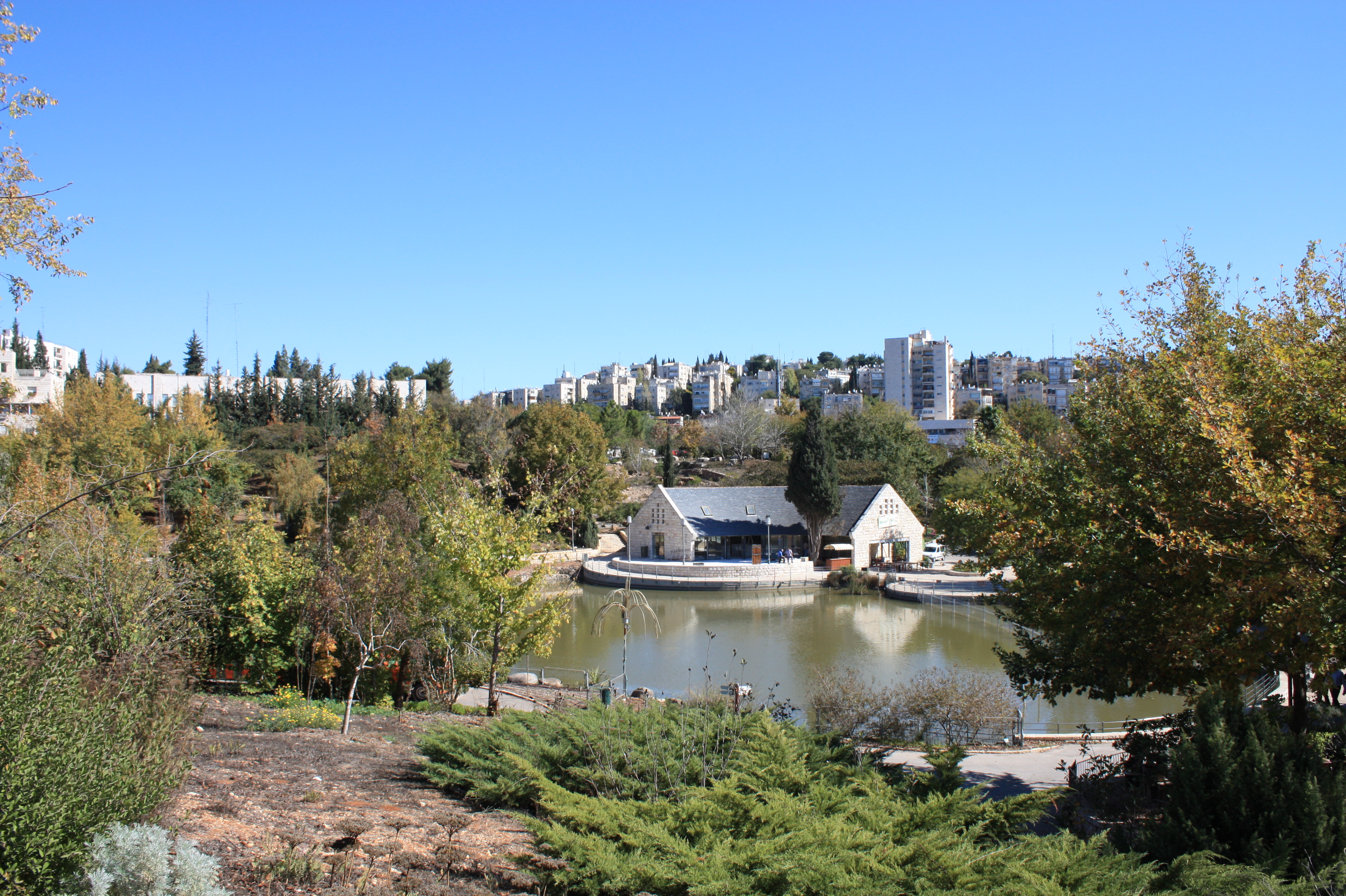 הגן הבוטני בגבעת רם